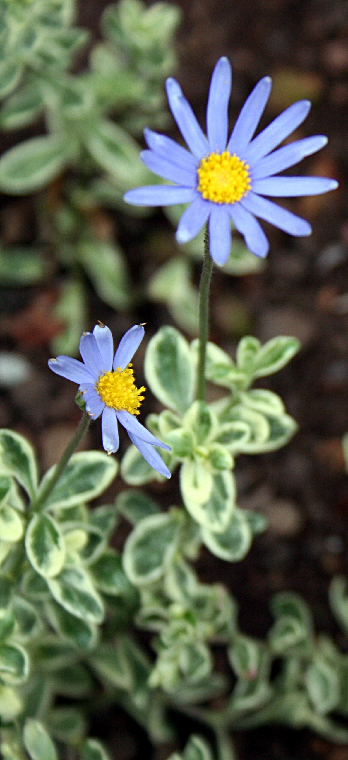 Funchal_-_Botanical garden: Felicia_amelloides